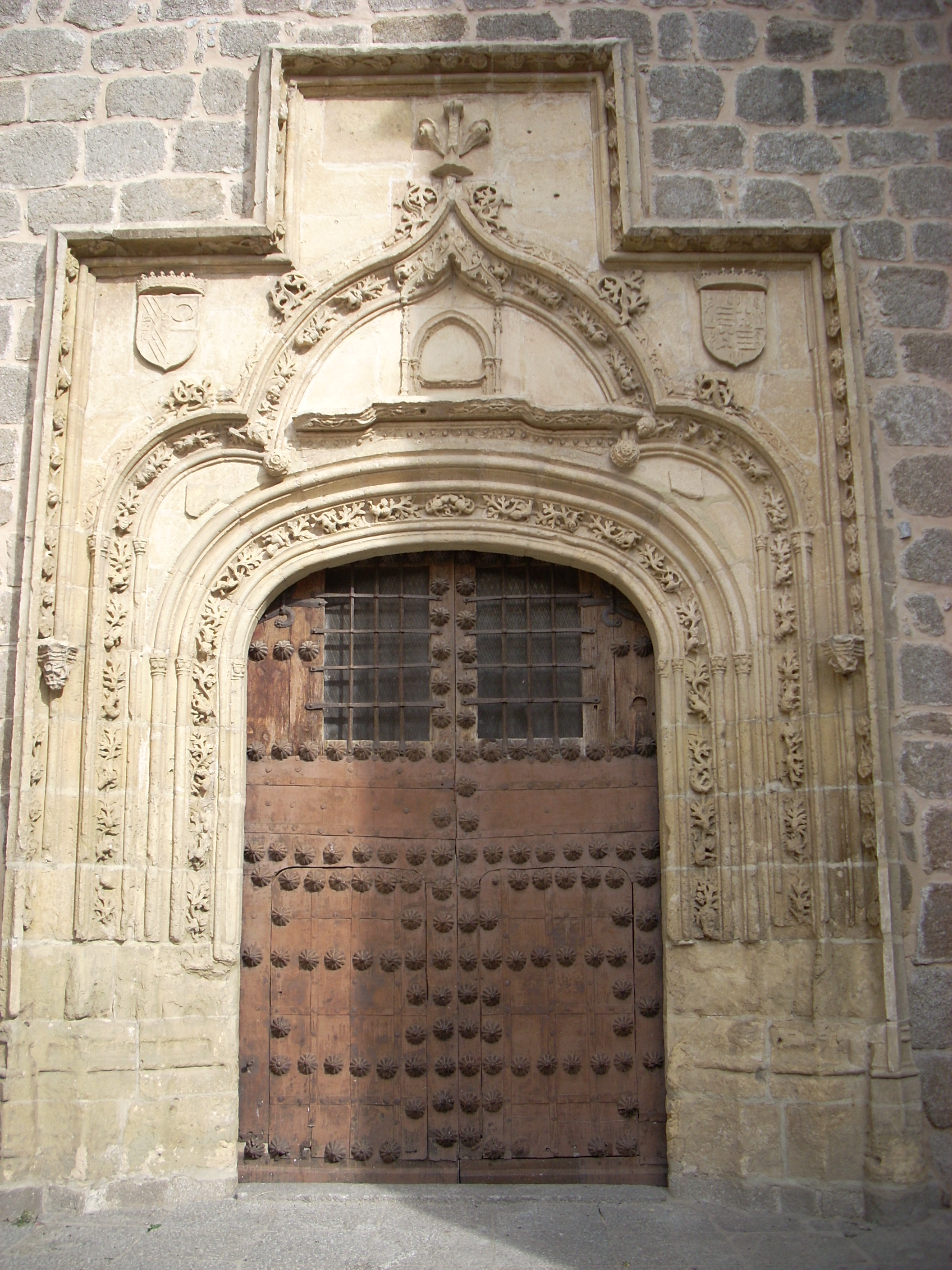 Basilica di Colmenar Viejo, Madrid, Spagna